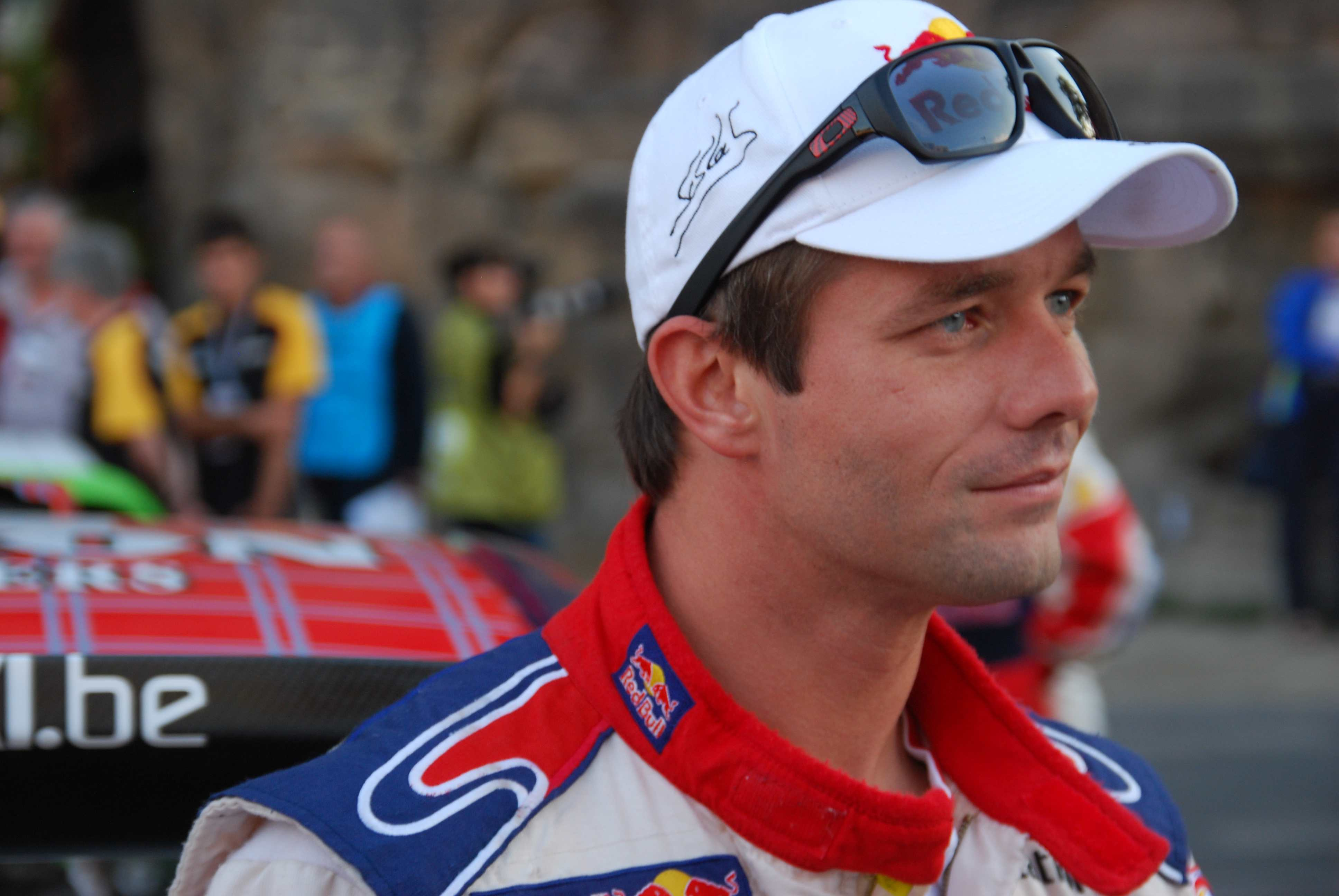 Sebastién Loeb bei der Deutschland-Rallye Trier 2010